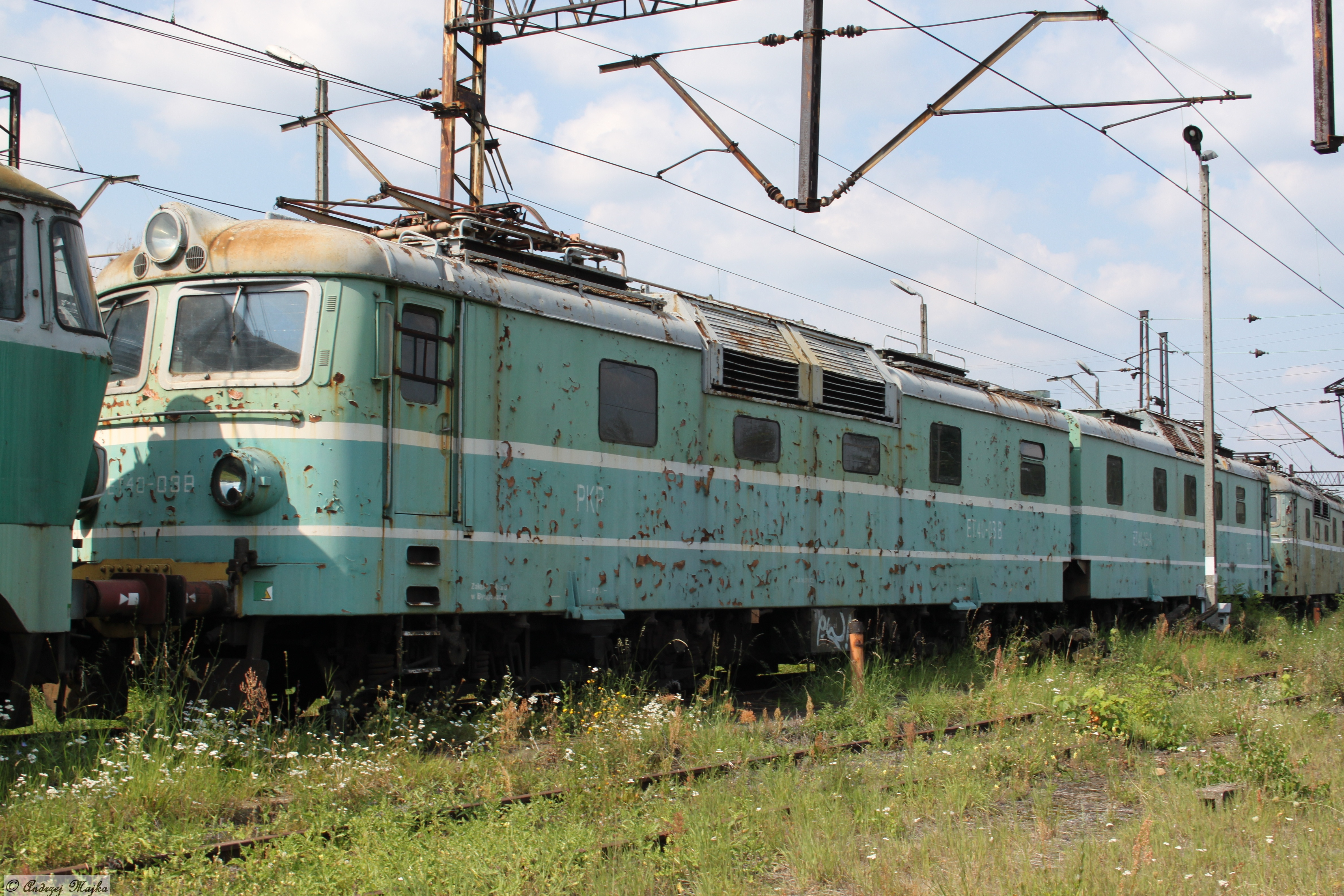 Lokomotywa elektryczna ET40-03 przewoźnika PKP Cargo na stacji kolejowej w Tarnowskich Górach.